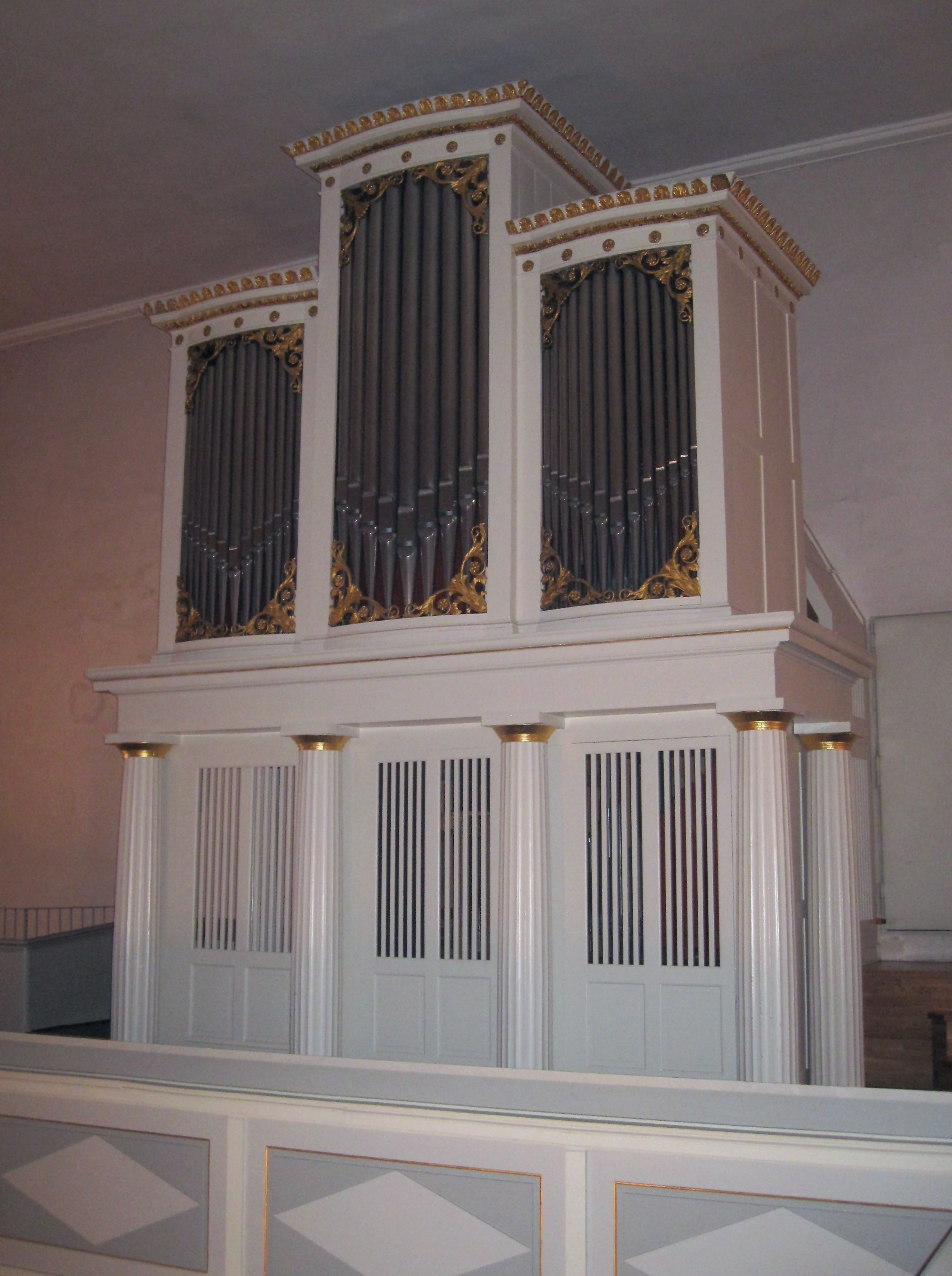 Margarethenkirche (Baudenkmal), Am Kirchplatz in Kierspe. Roetzel-Orgel aus dem Jahr 1828.